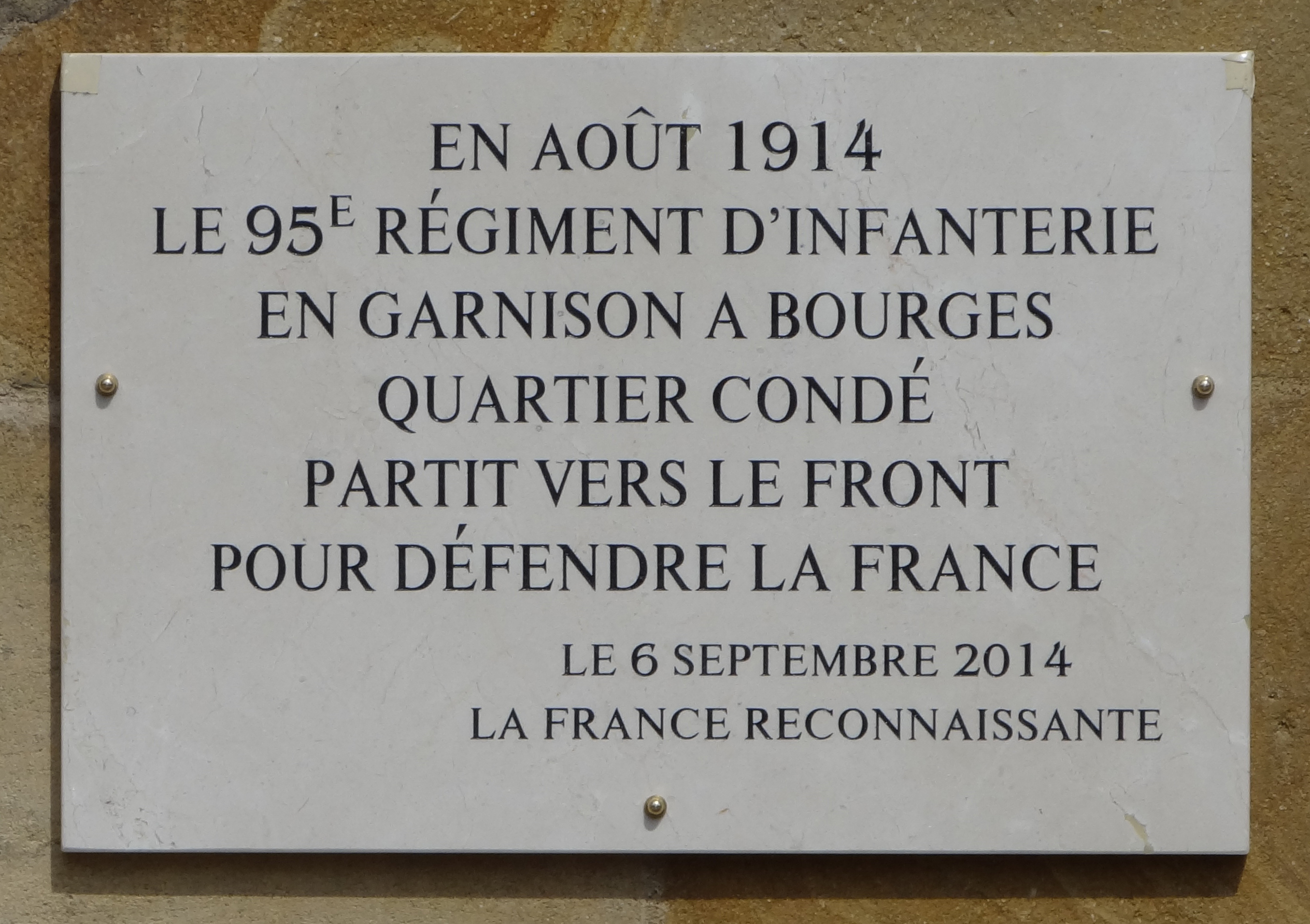 Plaque commémorative dévoilée le 6 septembre 2014 à l'occasion du centenaire de la grande guerre. Caserne Condé à Bourges, Cher.